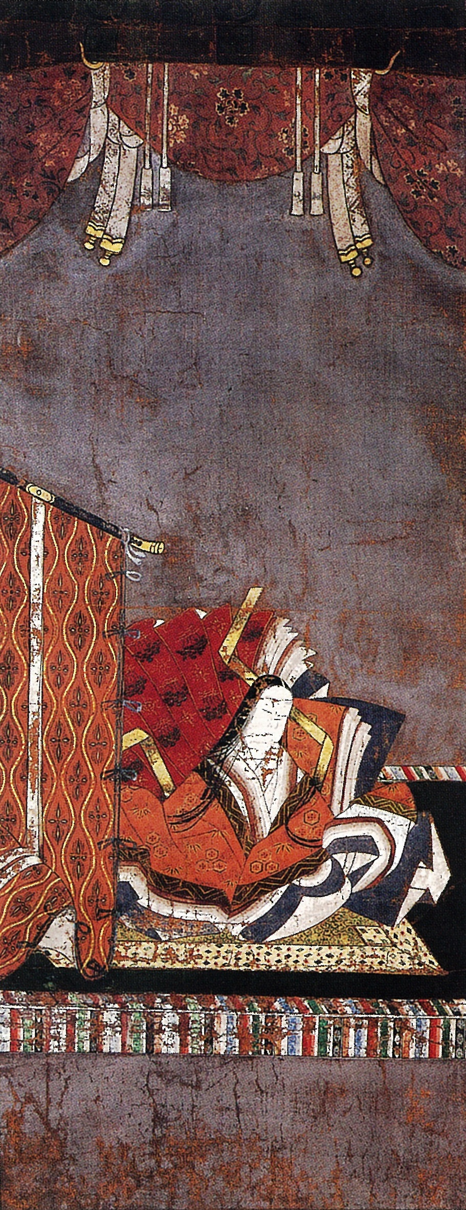 鳥羽天皇の皇女・暲子内親王（八条院）の肖像画。